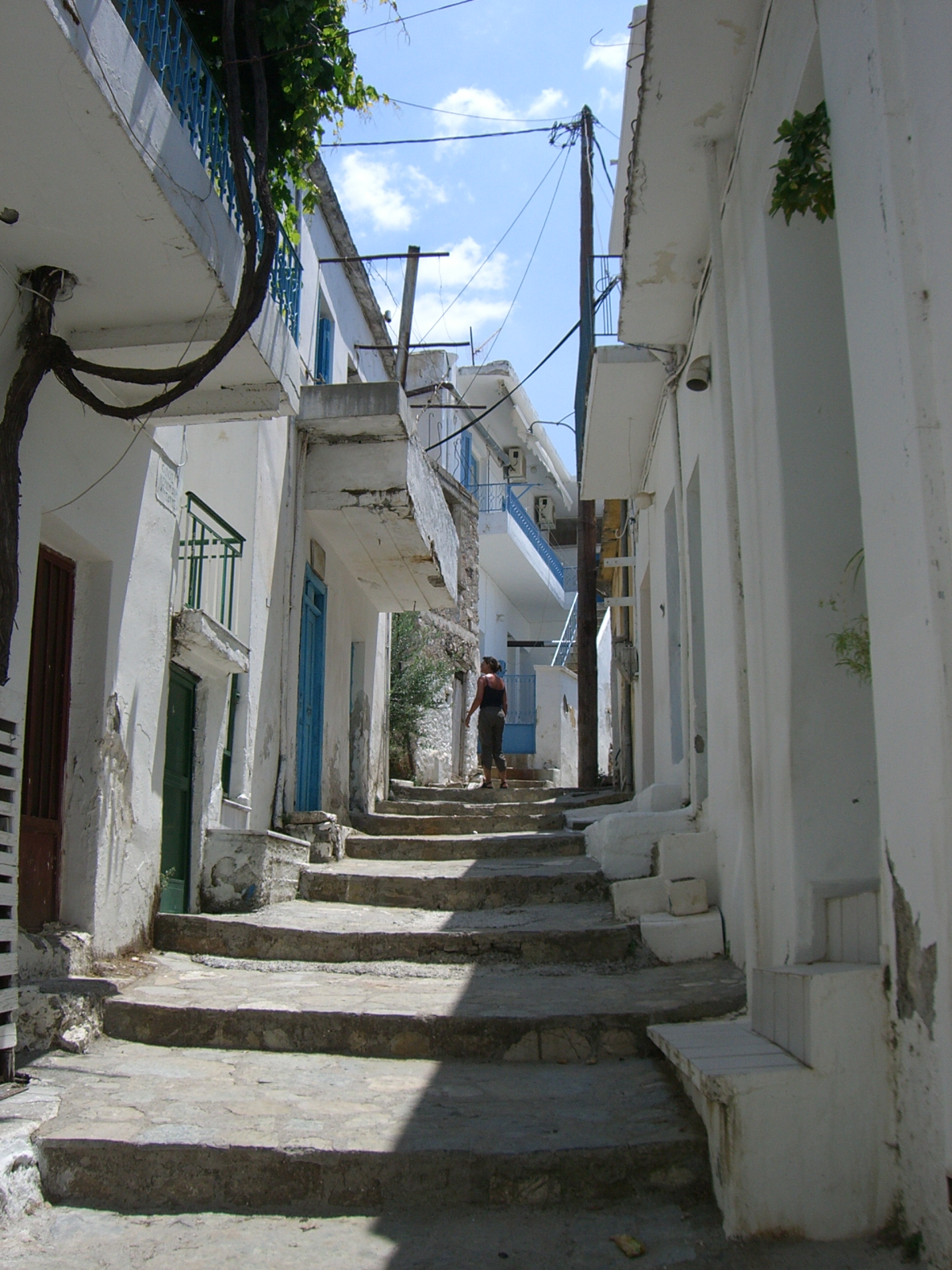 Ano Vianos, Kreta